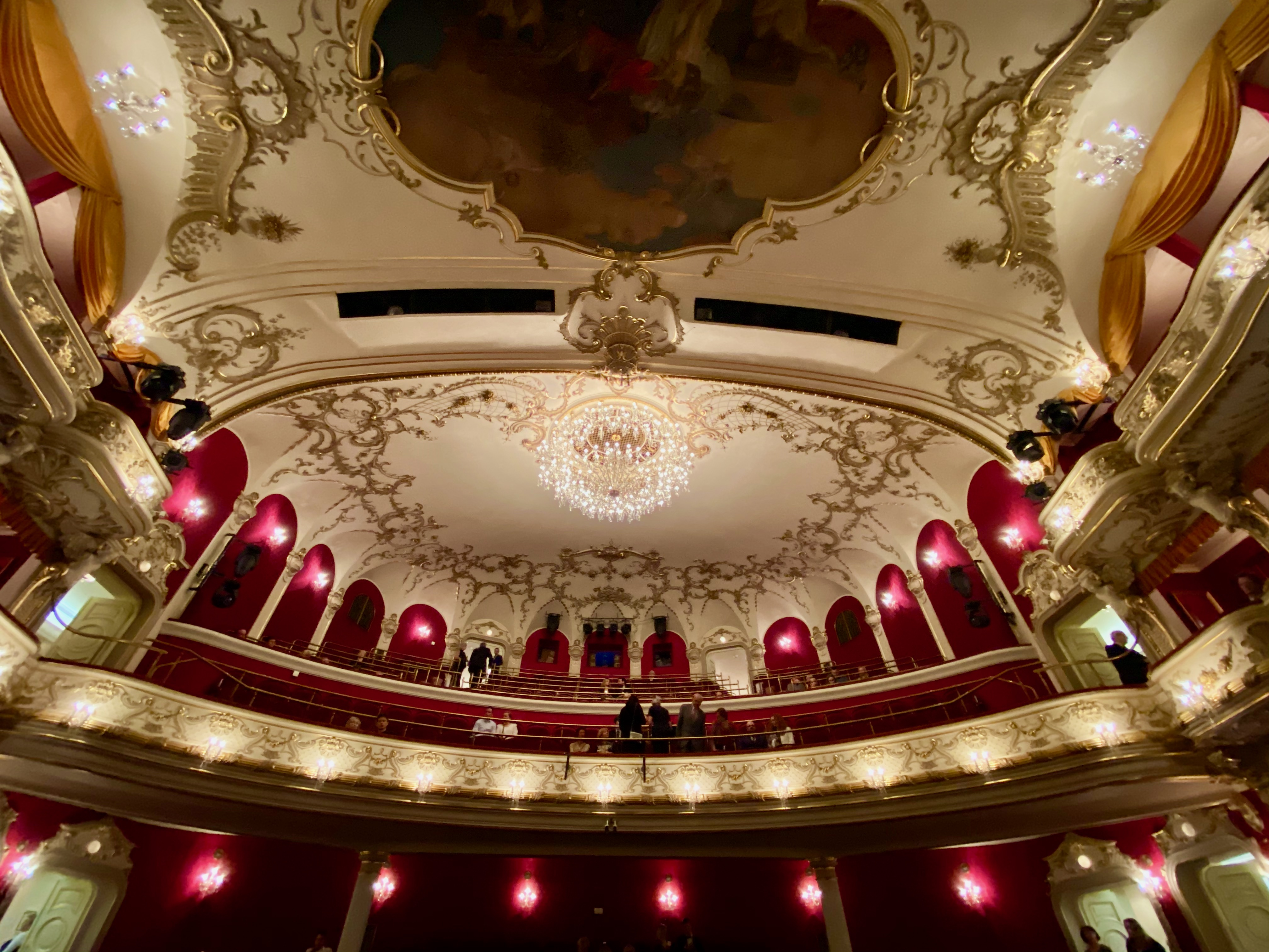 Teatre Antonín Dvořák - Interior